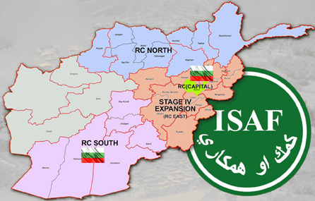 Българската Армия в Афганистан